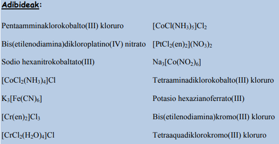 Nomenklatura adibideak